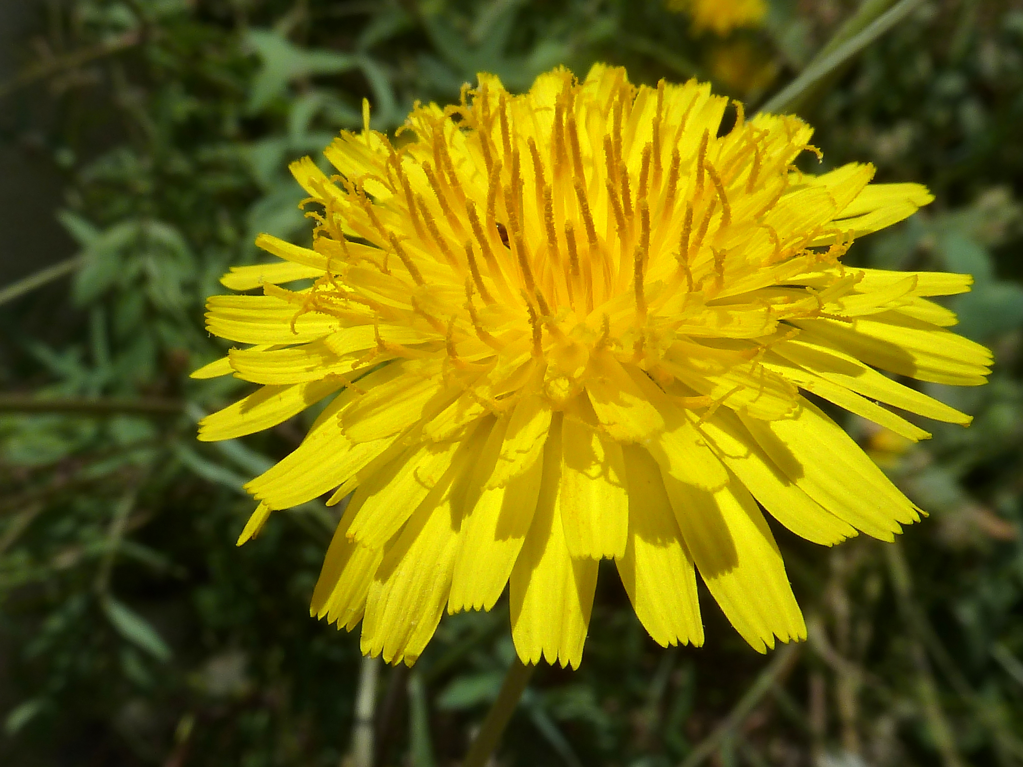 Sonchus tenerrimus - (cerraja menuda, cerraja tierna,...) - Capítulo en preantesis. - Solar calle Compositor Manuel Berná García, Albatera (Provincia de Alicante, España).